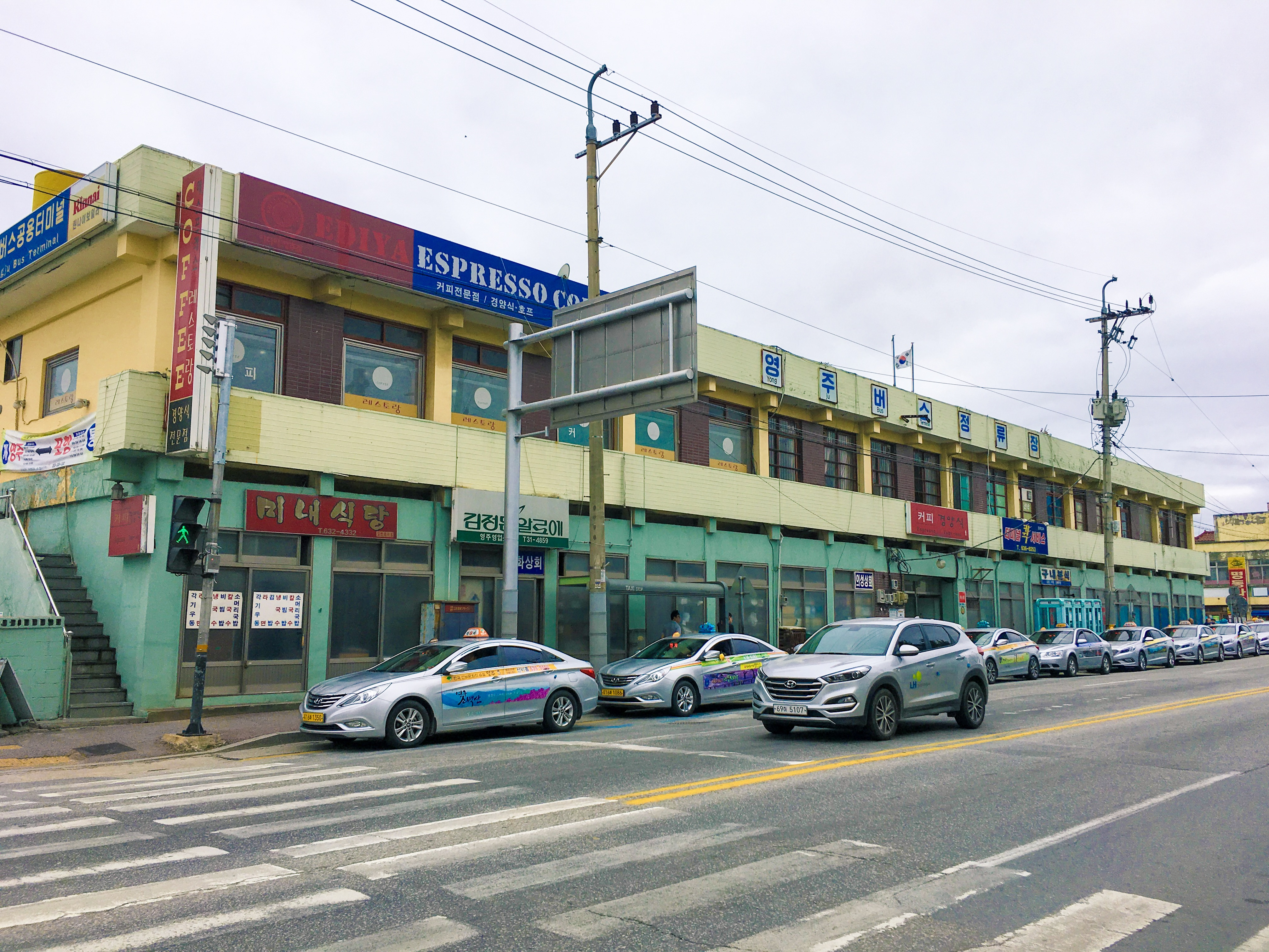 영주버스공용터미널 건물